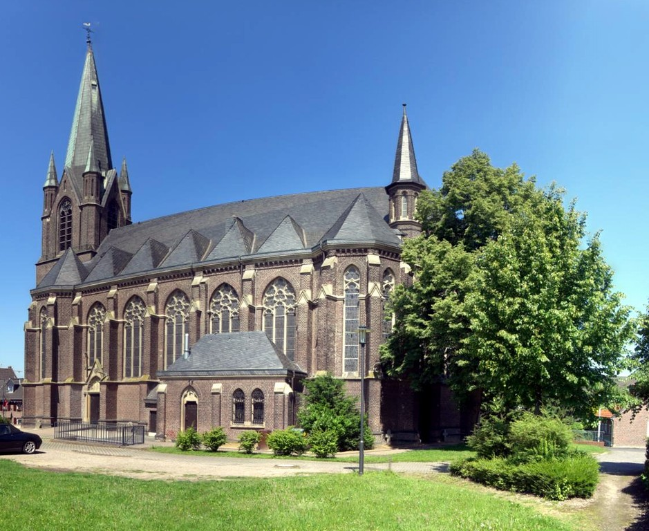 Kirche in Amern. Selbst fotografiert. Zu sehen ist die Kirche von Ober-Amern St.Georg This image shows a heritage building in Germany, located in the North Rhine-Westphalian city Schwalmtal (Niederrhein) (no. 27).